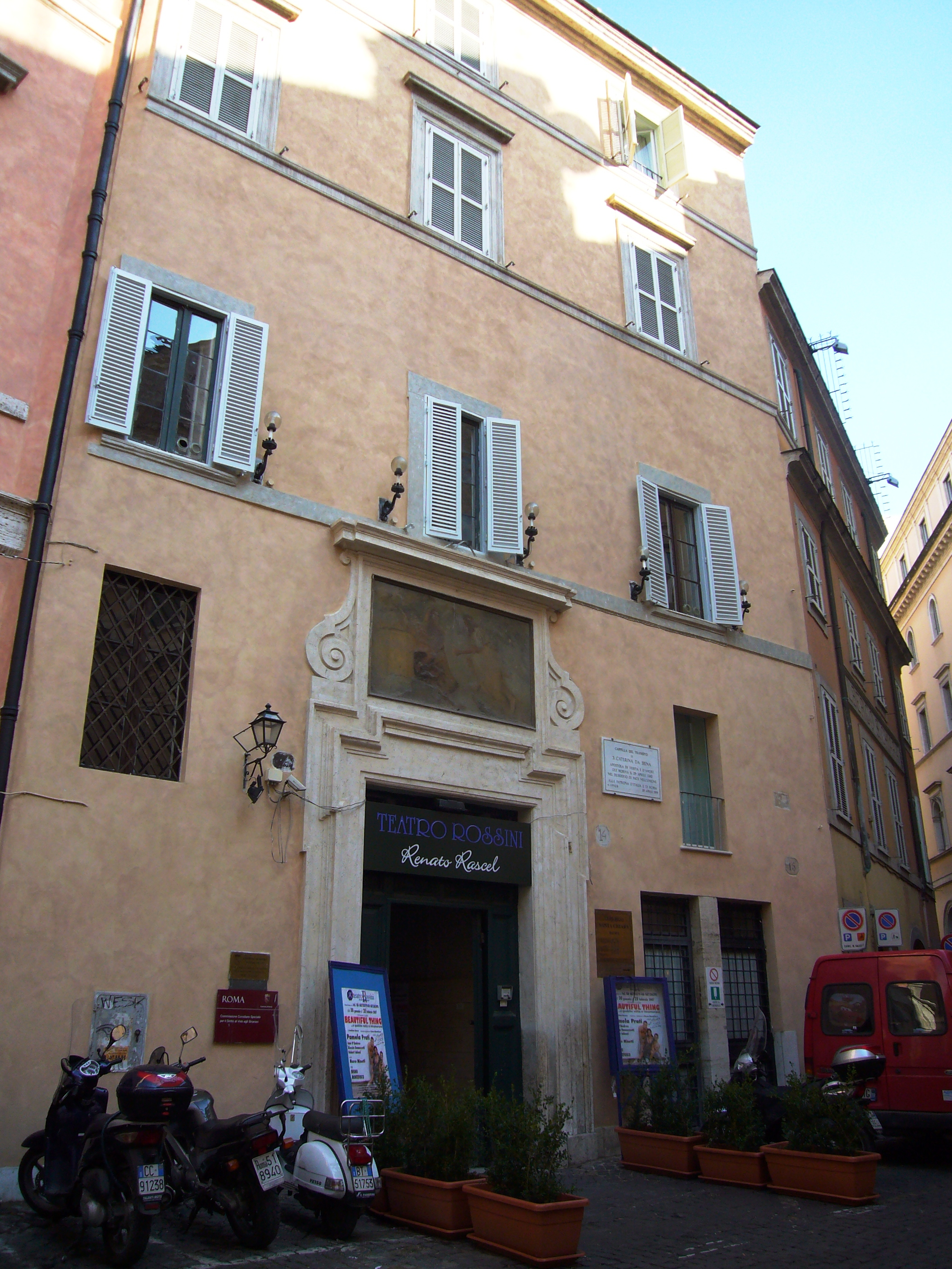 Roma, Teatro Rossini a via di S. Chiara